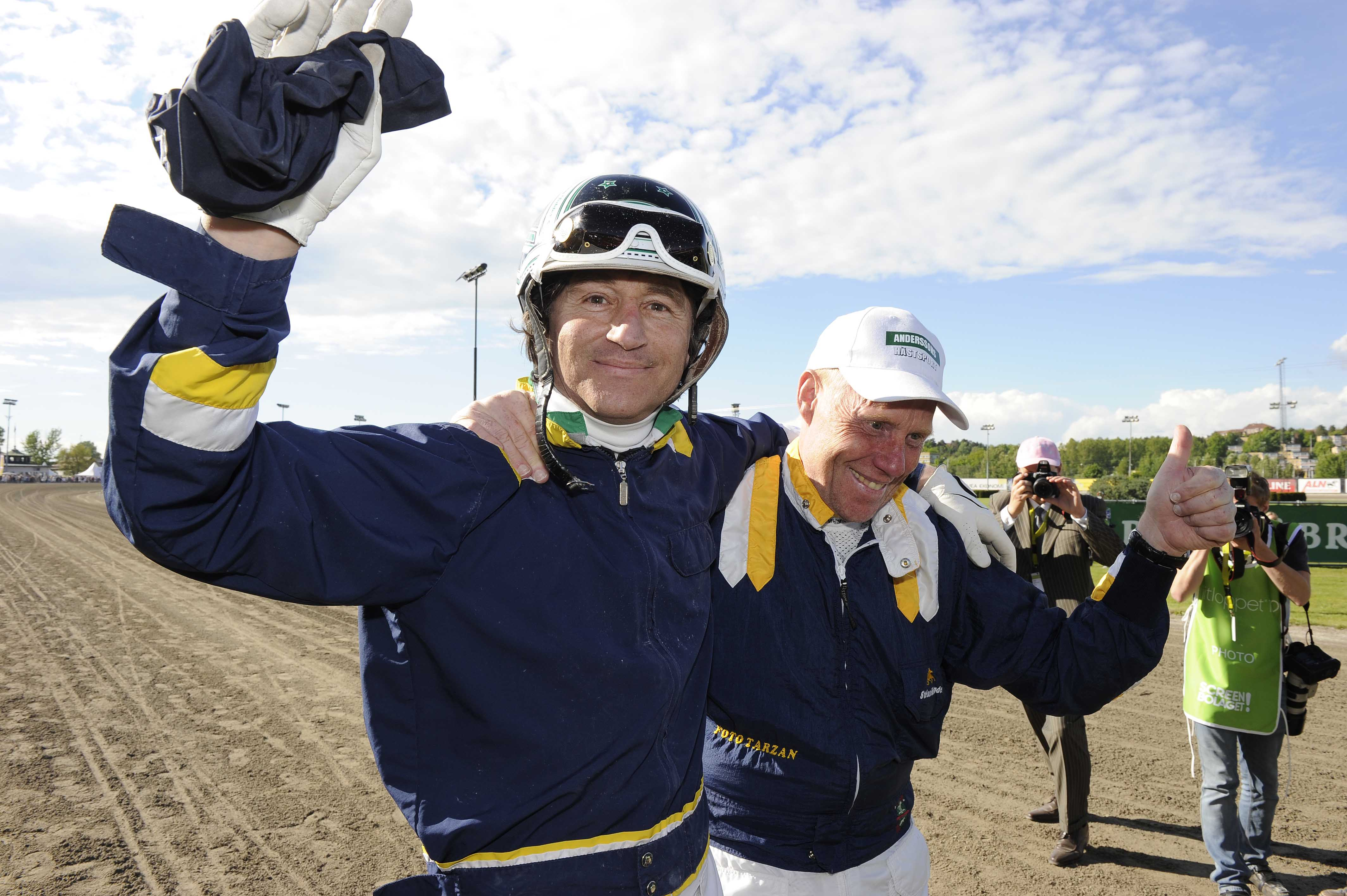 Kusken Johnny Takter (till vänster) och tränaren Stefan Melander vinner Elitloppet 2010 med Iceland.